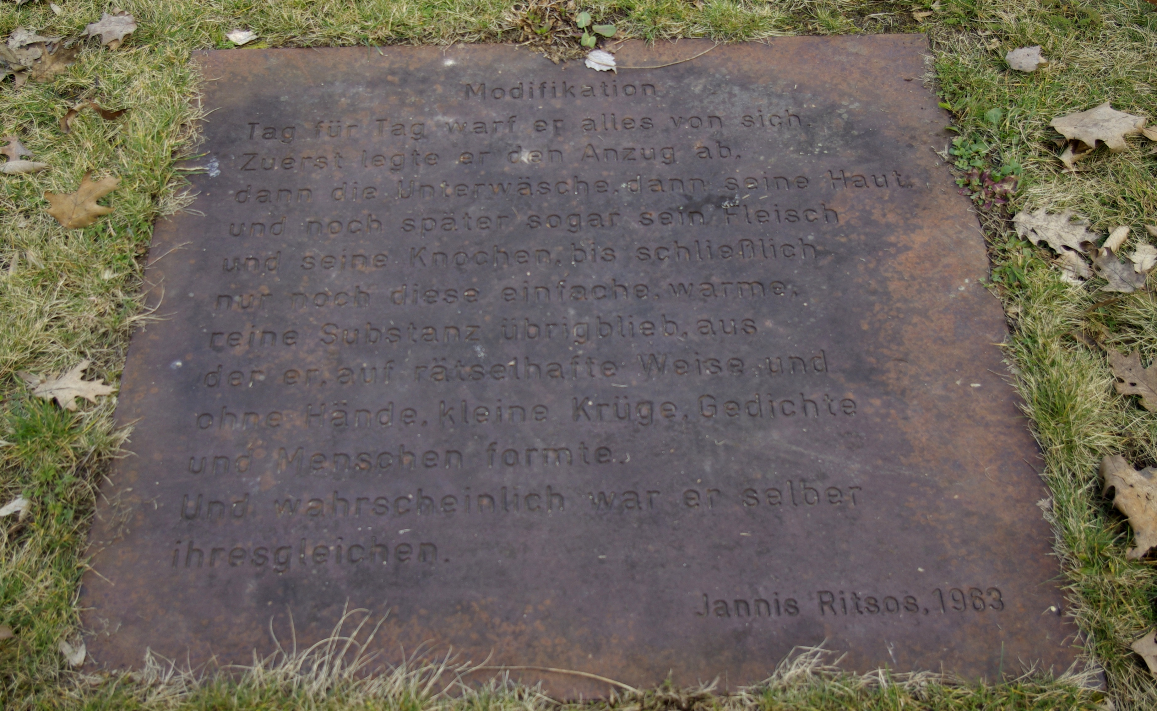 Skulptur Gefangene Steine 1 (1974) von Hans-Jürgen Breuste in Erlangen